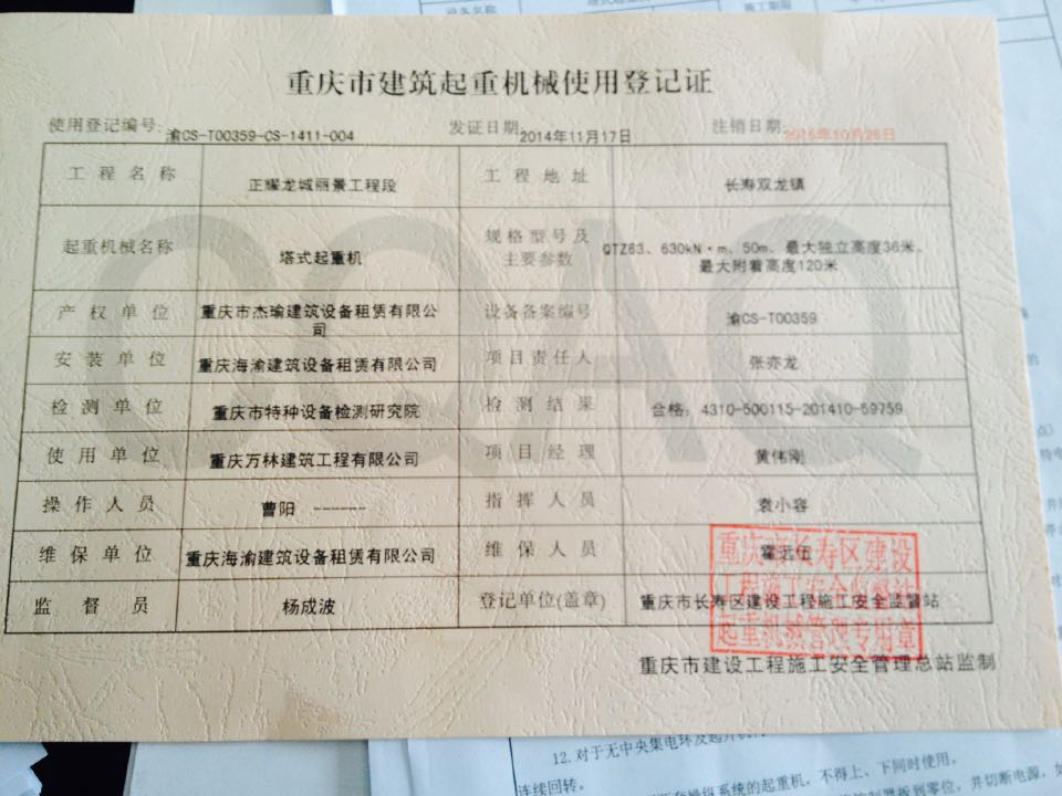 这是我自己拍摄的作品，授权维基百科使用。